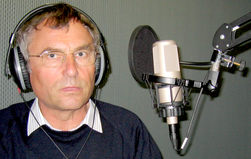 28. März 2007: Norbert Langer in einer Sprecherkabine bei der ProSiebenSat.1 Produktion Berlin während einer N24-Produktion.